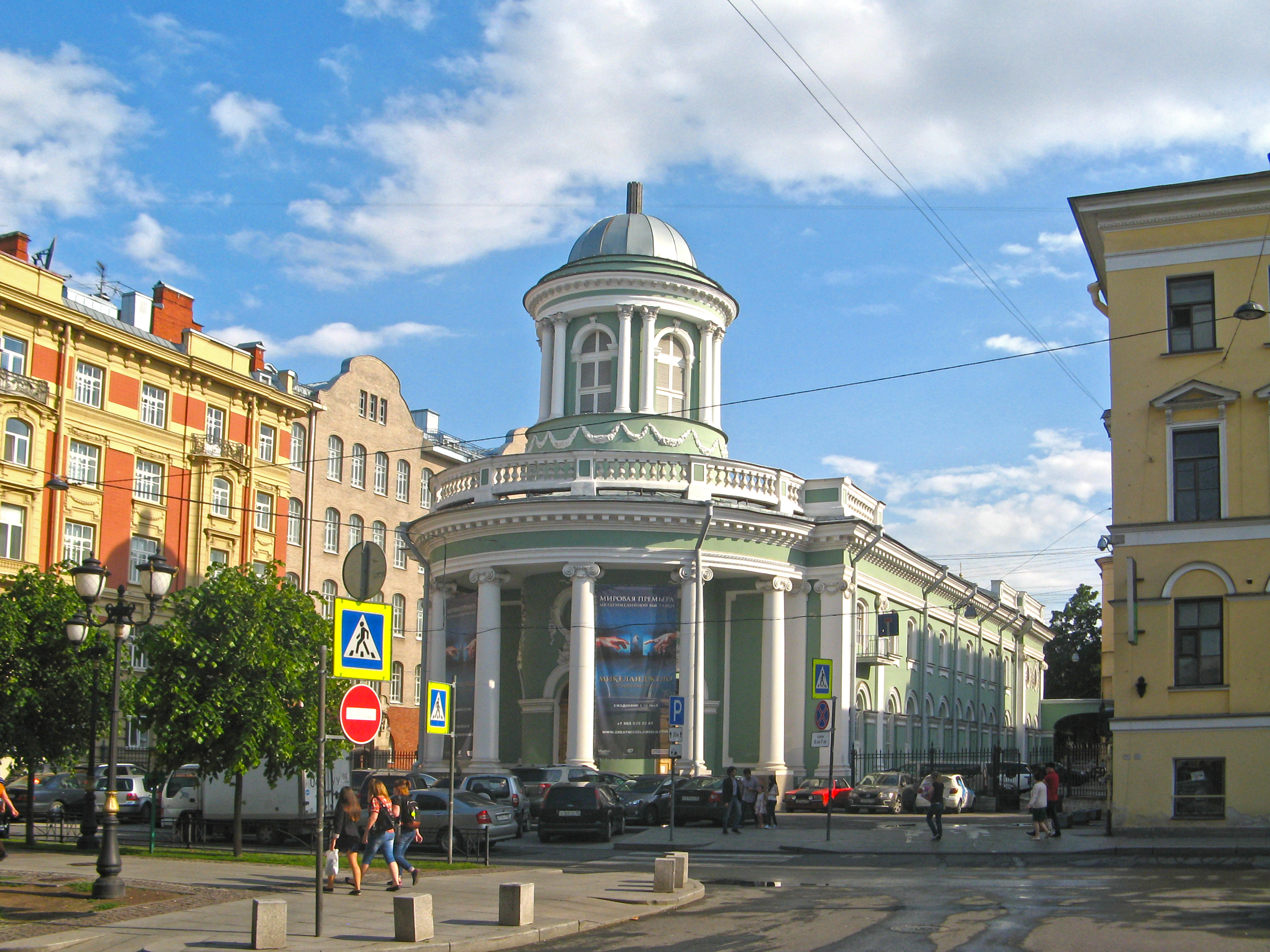 Евангелическо-лютеранская церковь Святой Анны: Кирочная улица, 8, Фурштатская улица, между домами 7 и 9, Центральный район, Санкт-Петербург